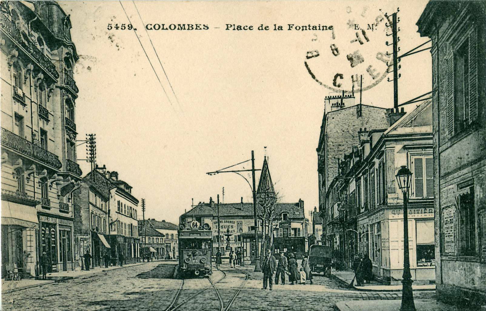 Carte postale ancienne éditée par EM n°5459 :COLOMBES - Place de la Fontaine